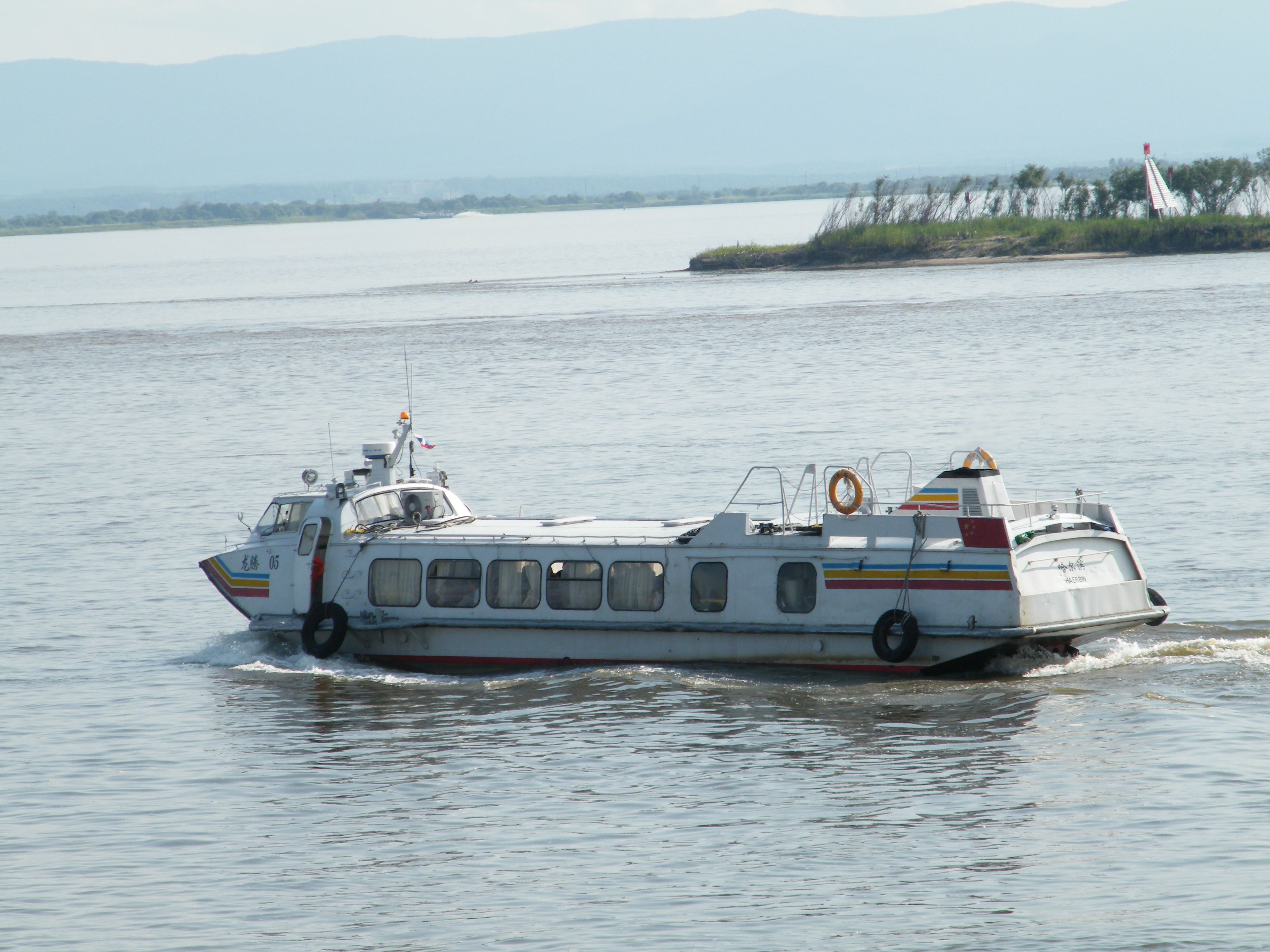 Китайский ЛУНТАН-5 в Хабаровске